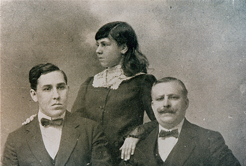 Waldo Álvarez Insua con fillos